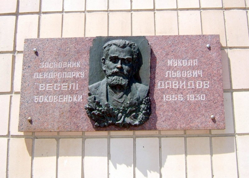 Меморіальна дошка на честь Миколи Давидова